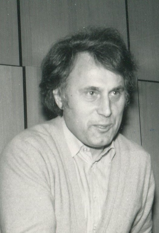 Porträt Freimut Duve